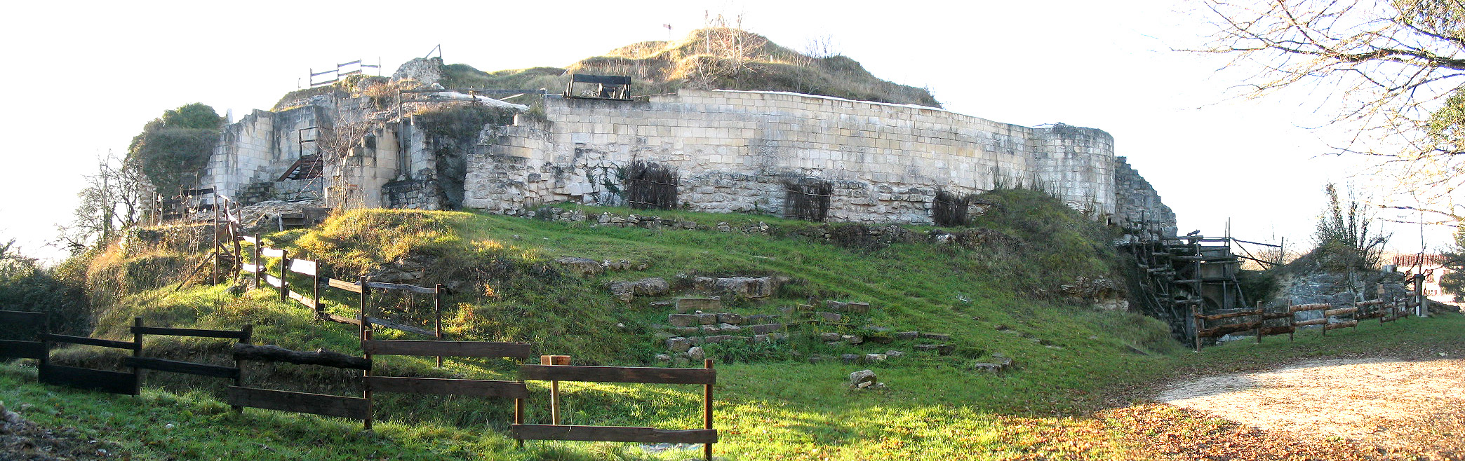 Motte féodale (reste du château) de Merpins détruite en 1387.